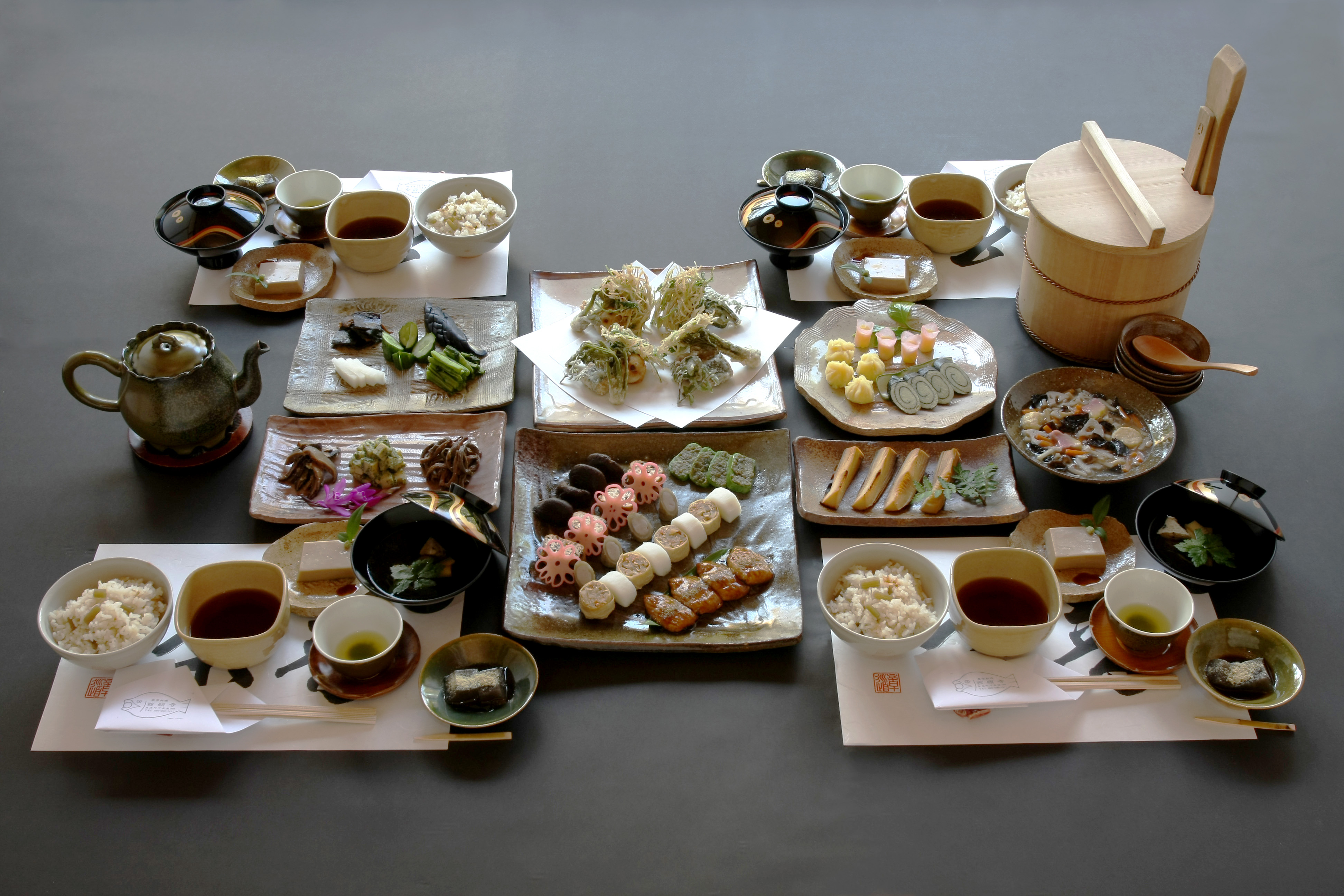 西願寺で提供している普茶料理